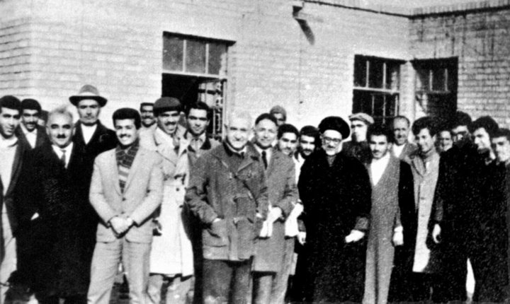 دکتر سحابی آیت الله طالقانی